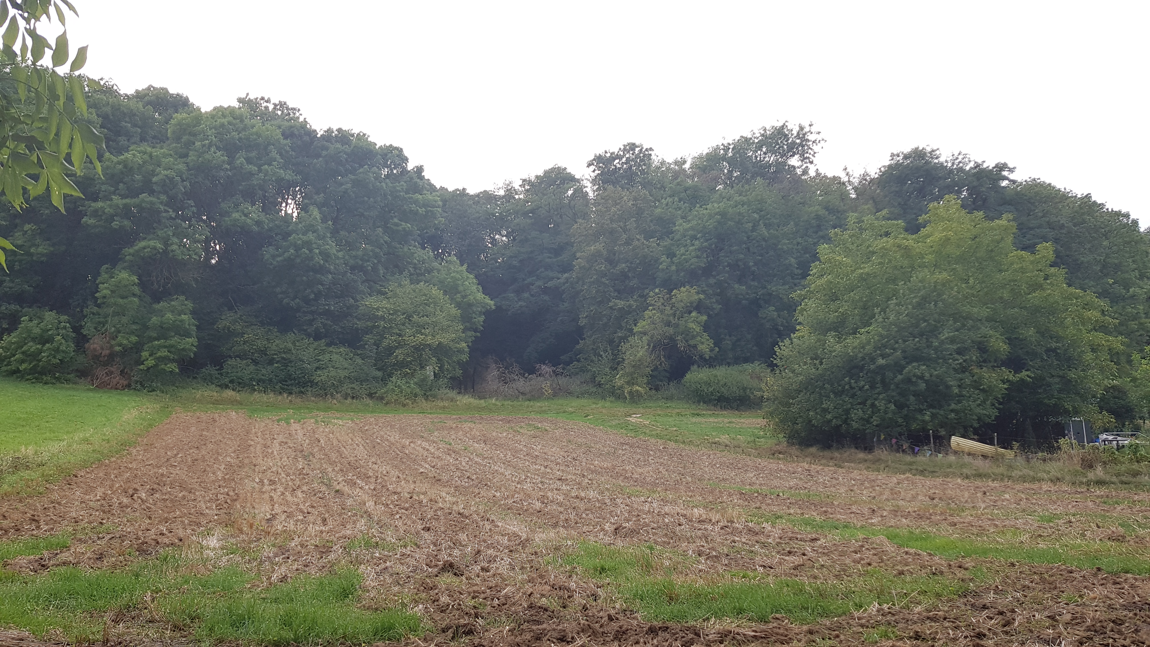 Grotwoning De Kluis, Maastricht, Nederland